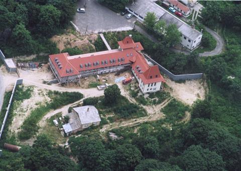 Kesztölc-klastrompuszta, Hungary, aerialphotography